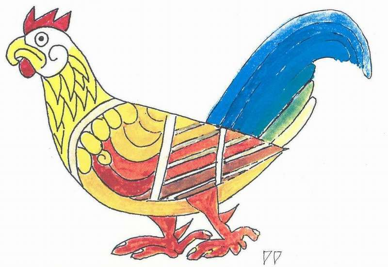 Tyúk ábrázolása a Book of Kells című kelta kódexből